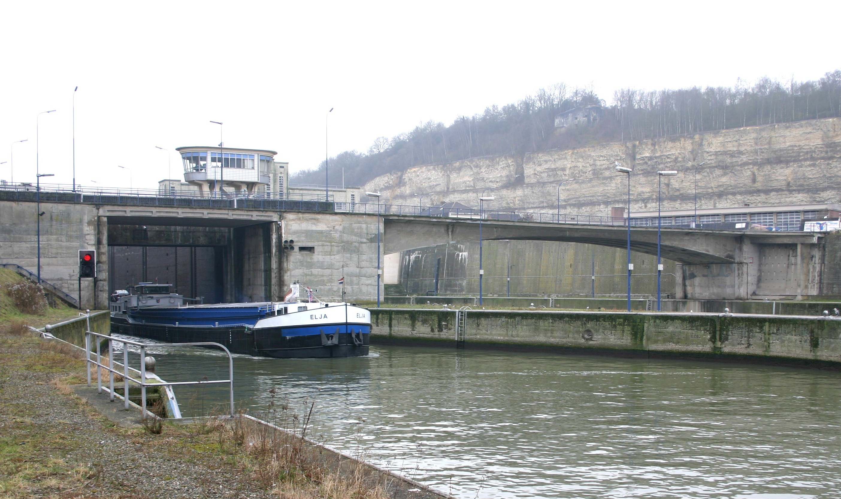 Schleis vu Lanaye ënnescht Paart.